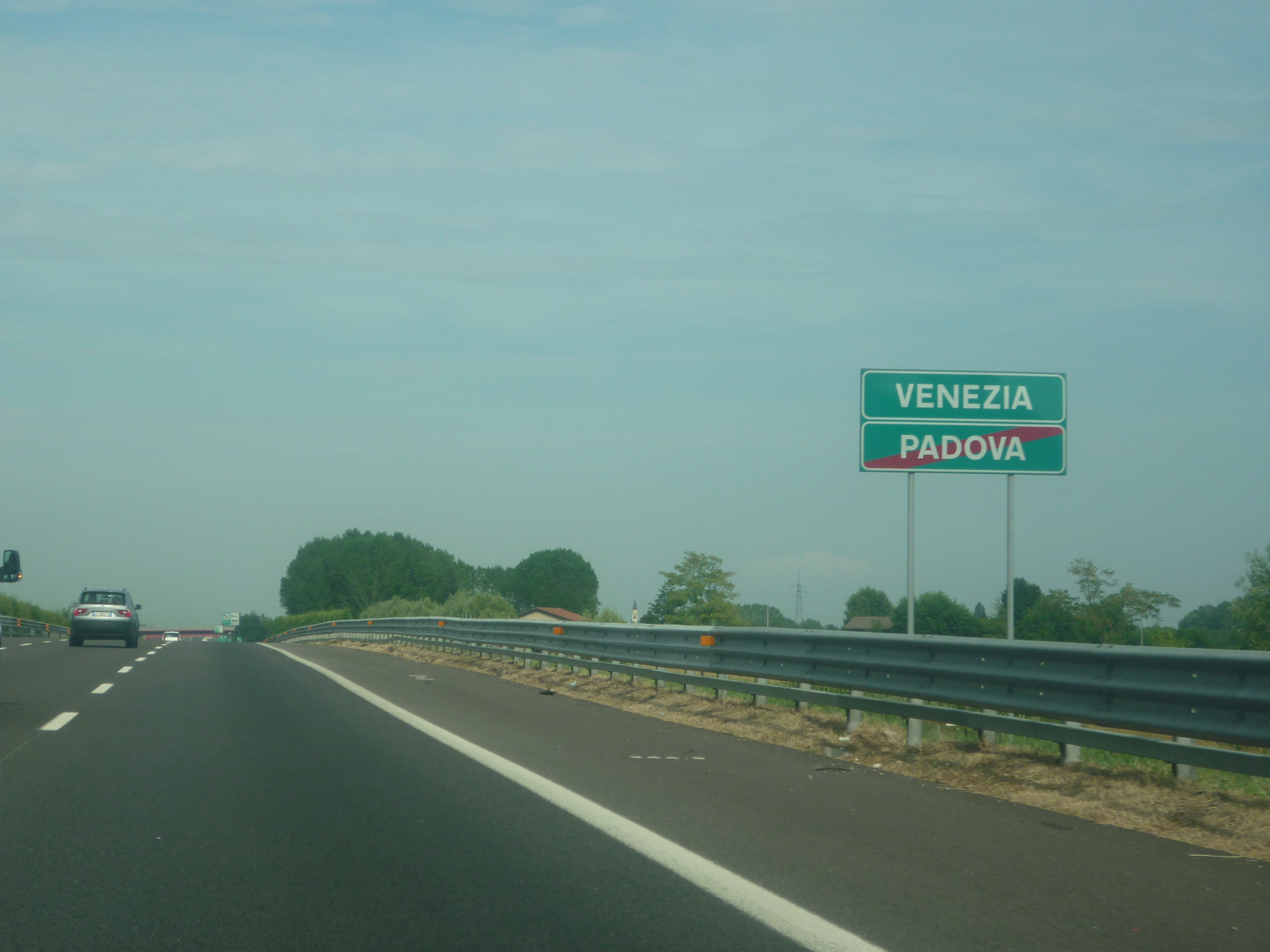 A4